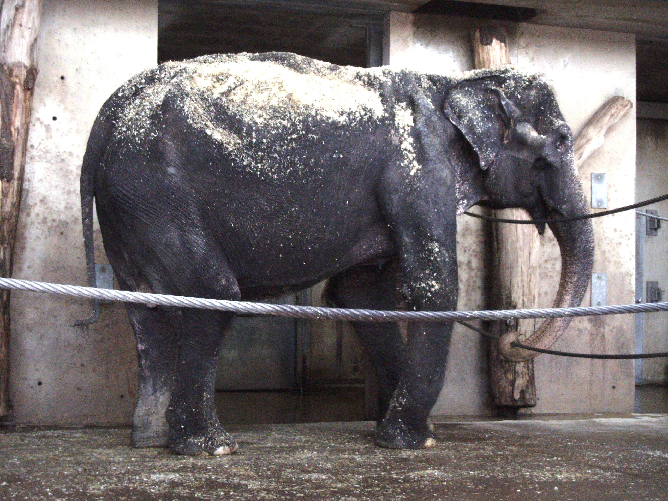 Elefantin Vilja